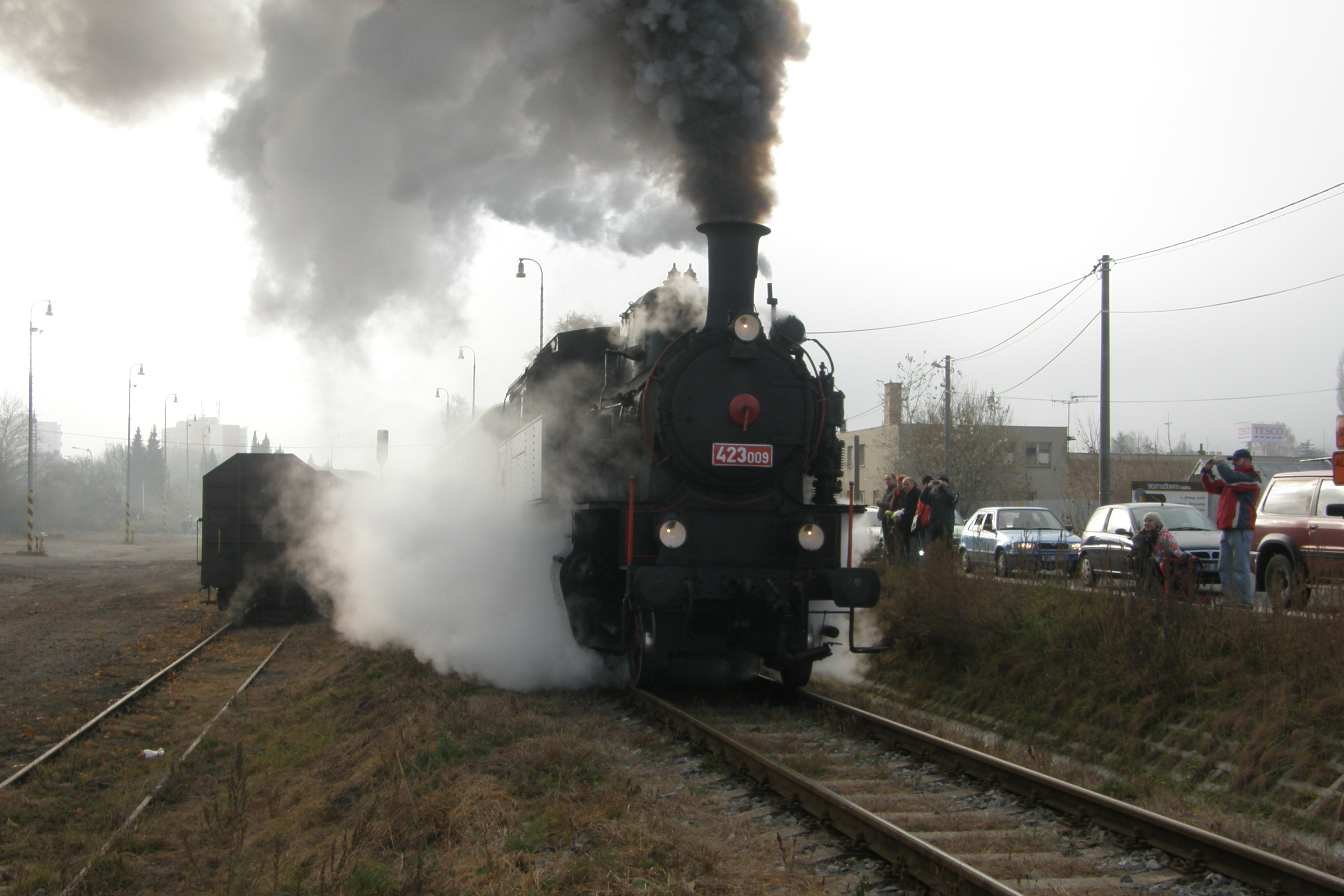 Parní lokomotiva 423.009 při Mikulášské jízdě Chornického železničního klubu v Boskovicích